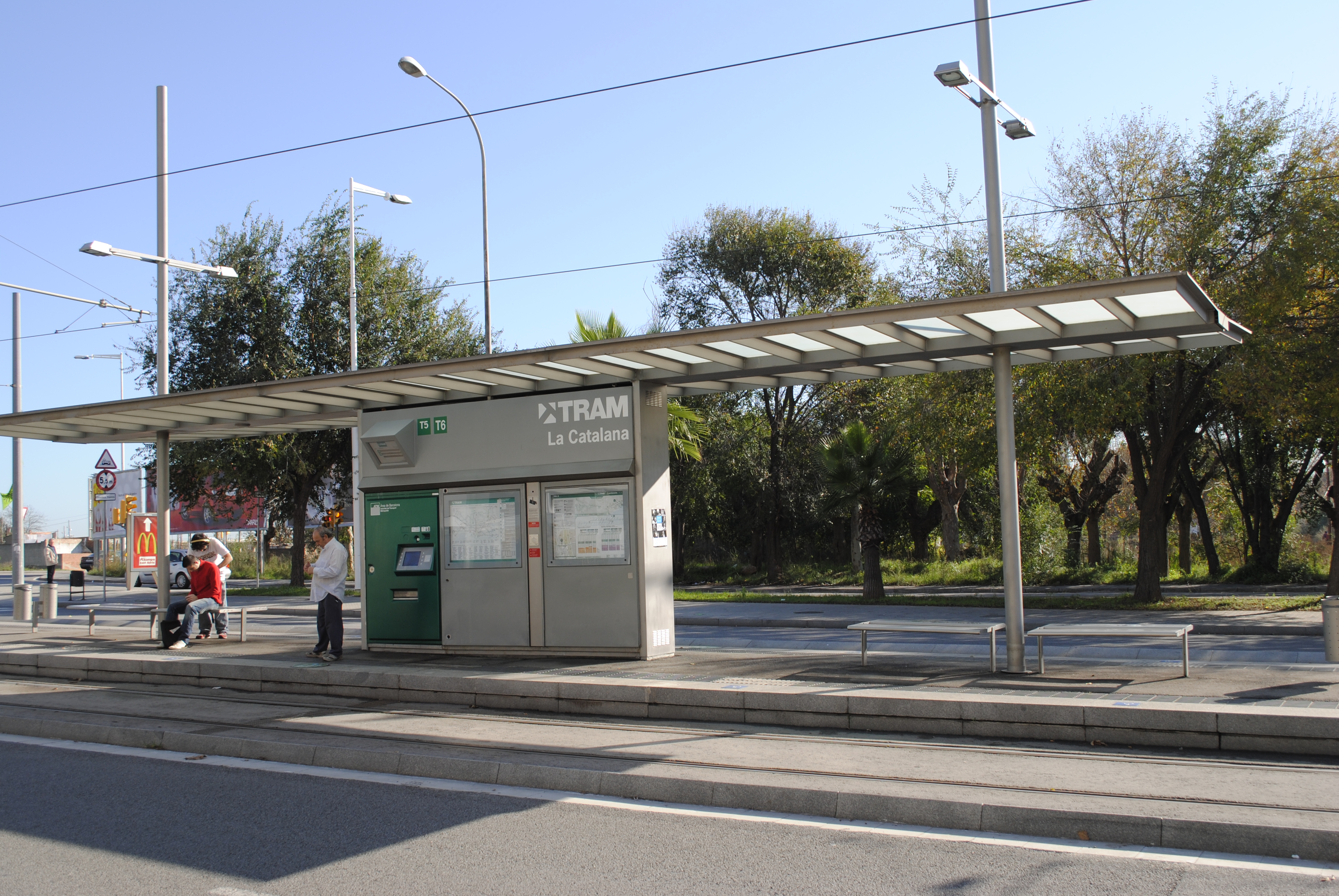 Estació Trambesòs la Catalana